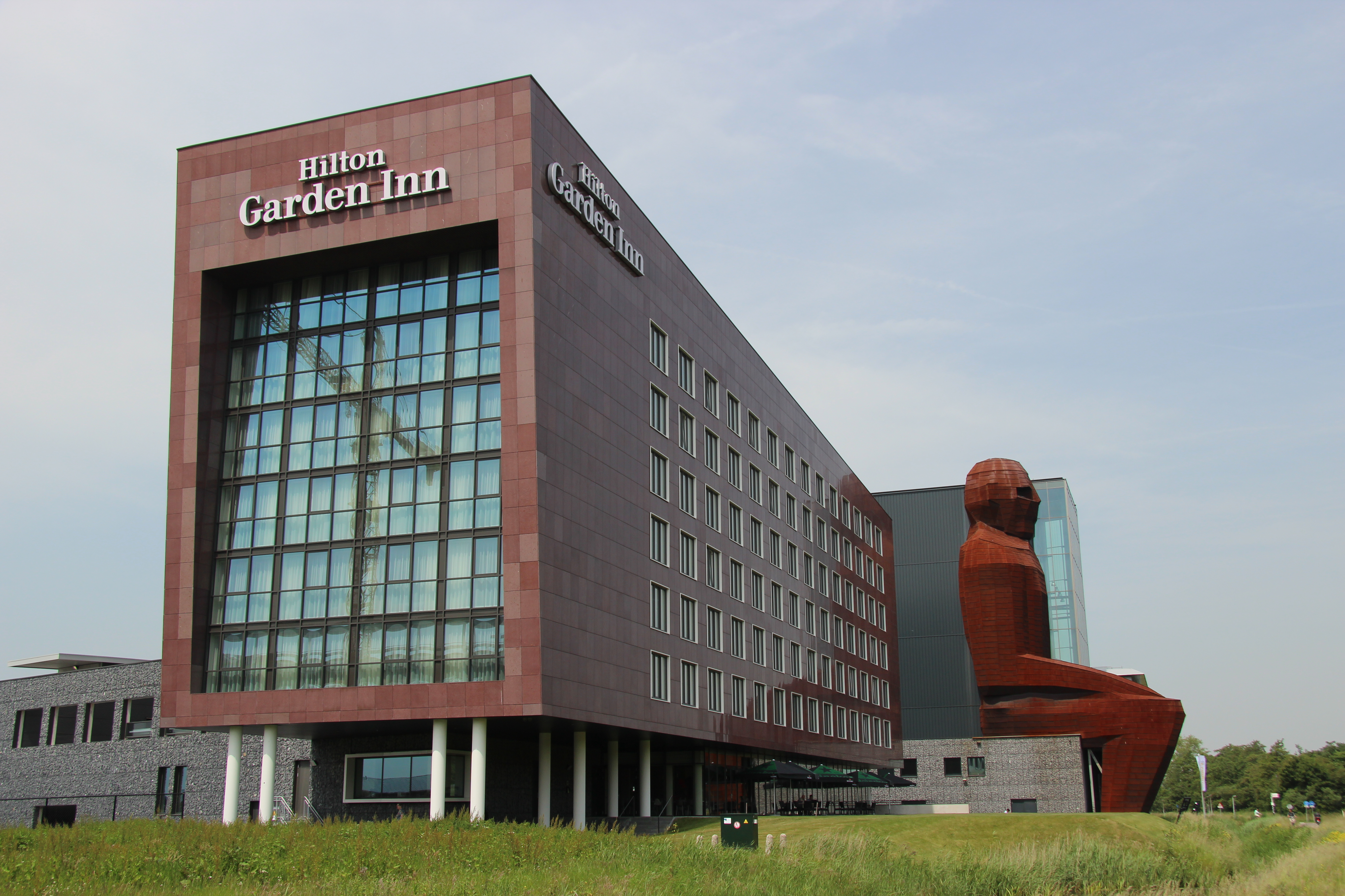 Hilton Garden Inn Oegstgeest.